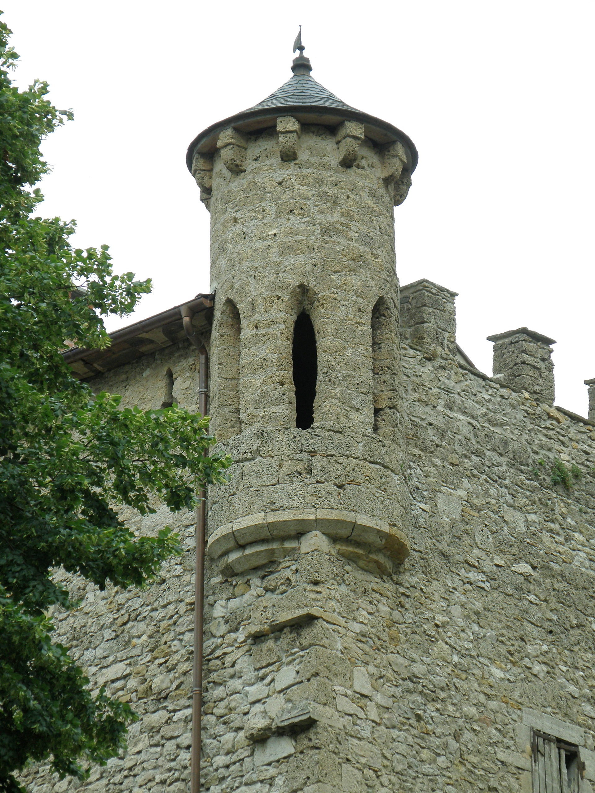 Bourdeau, comm. du département de la Savoie (région Rhône-Alpes, France), sur le bord du lac du Bourget. Château mediëval, gros plan sur une des échauguettes.